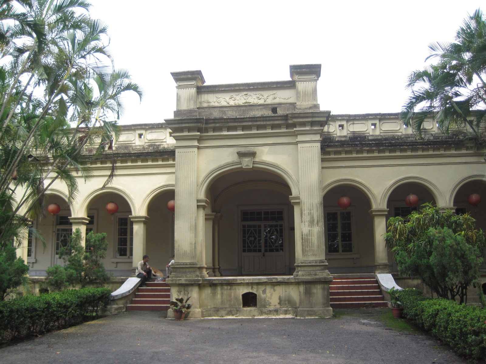 中文（台灣）: 高雄橋頭糖廠社宅事務所，為日治時期w:zh:臺灣製糖株式會社的第一代辦公廳舍。